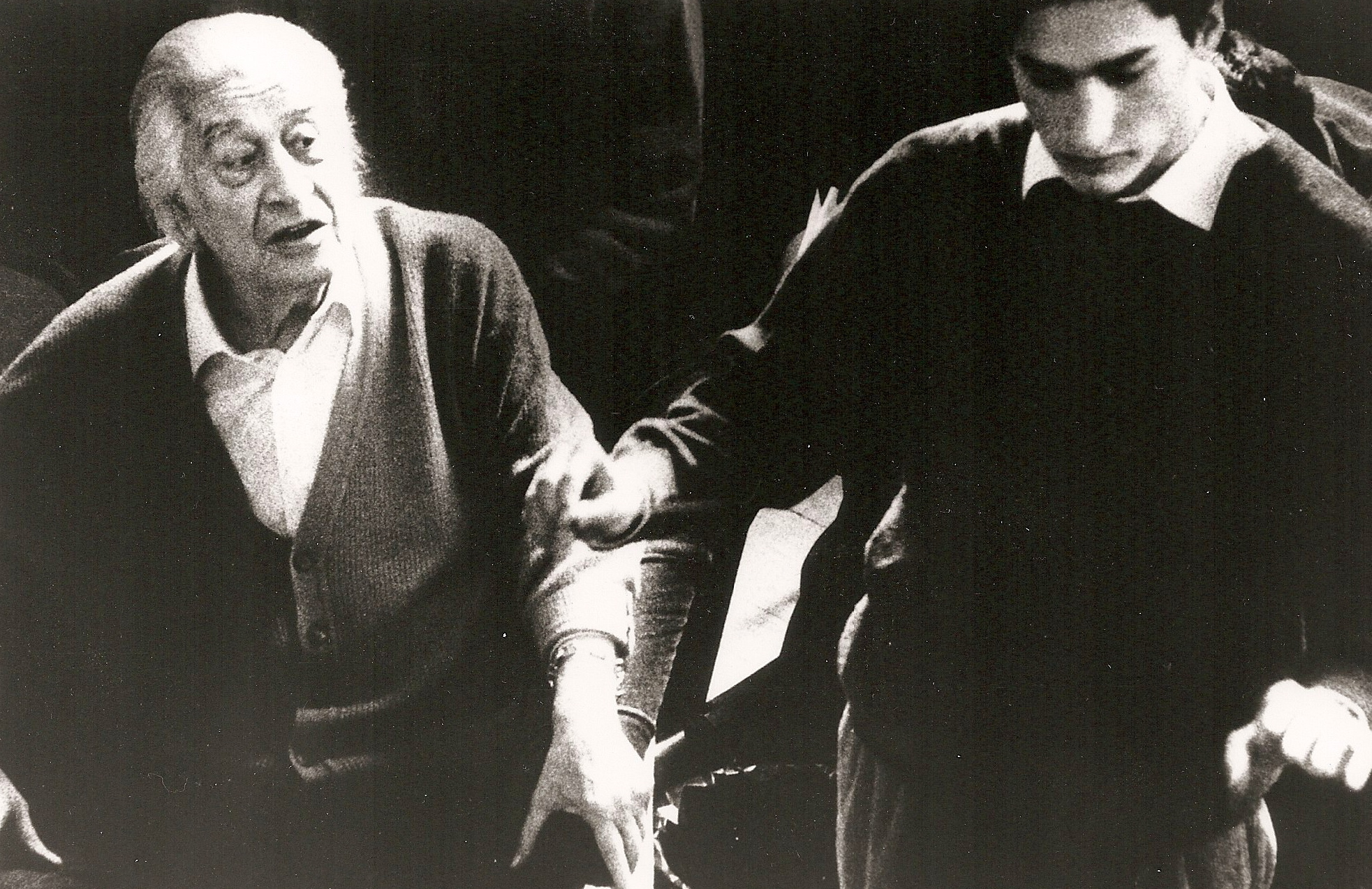 Rémy Ballot et Sergiu Celibidache en juin 1996